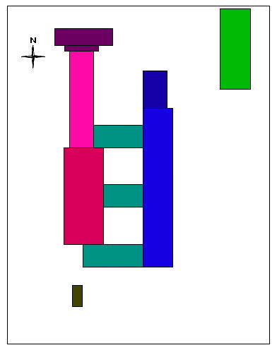 Genordeter Plan des Kreisgesundheitszentrums bzw. Kreiskrankenhauses, Schwedt/Oder, Gebäudegrundriss in der Draufsicht, nach der Fertigstellung im Jahre 1973